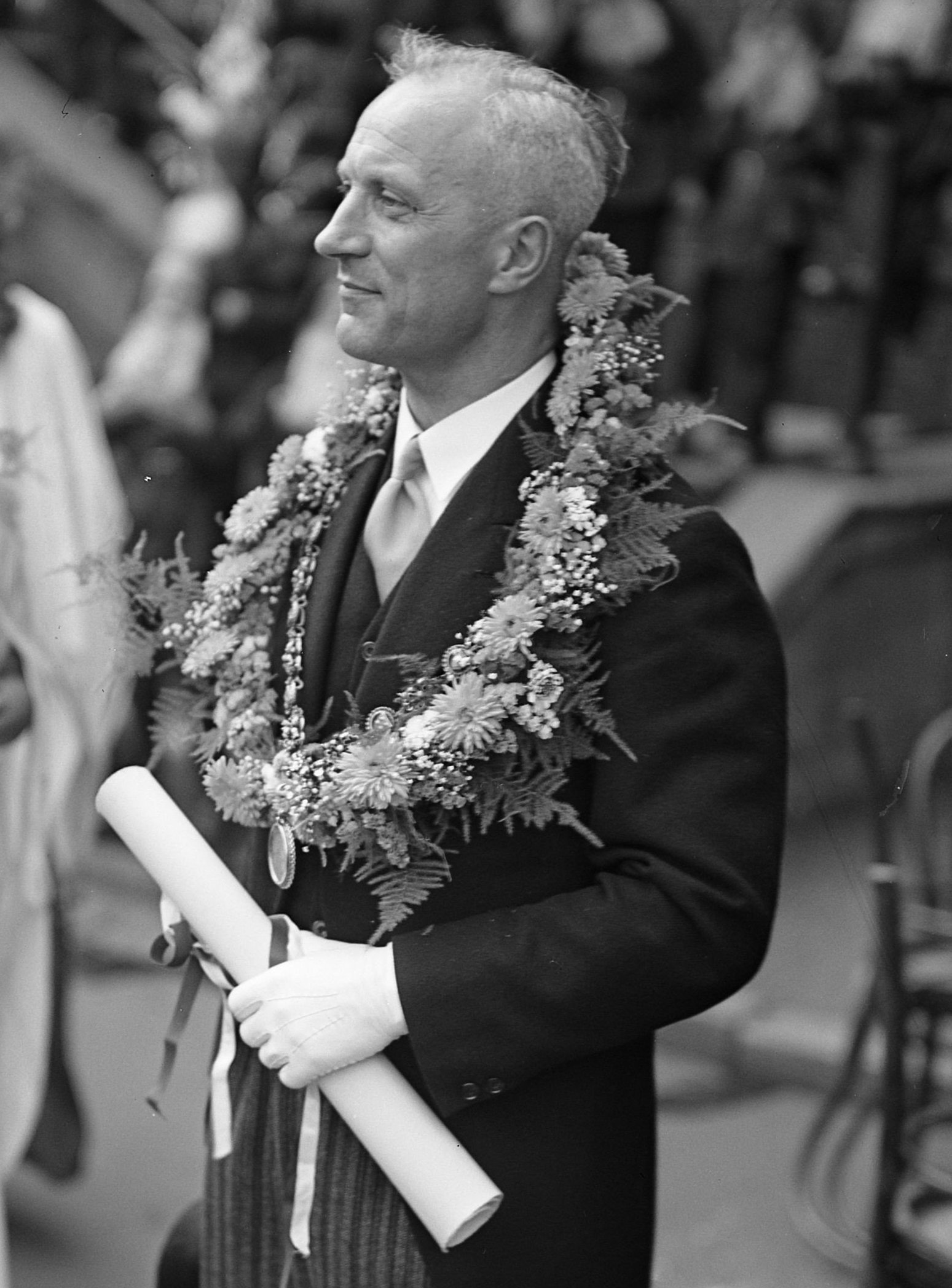 Bloemenfeest te Haarlem. Burgemeester Cremers